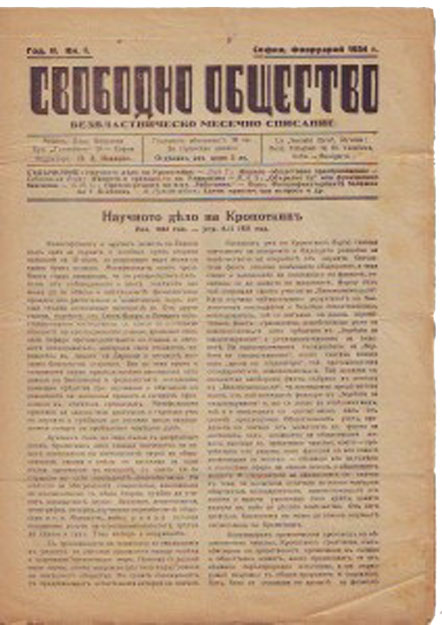 Безвластническо месечно списание "Свободно общество", излиза в 7 броя в периода ноември 1932 – февруари 1934 г. Явява се като теоретичен орган на Федерациятата на анархо-комунистите в България.